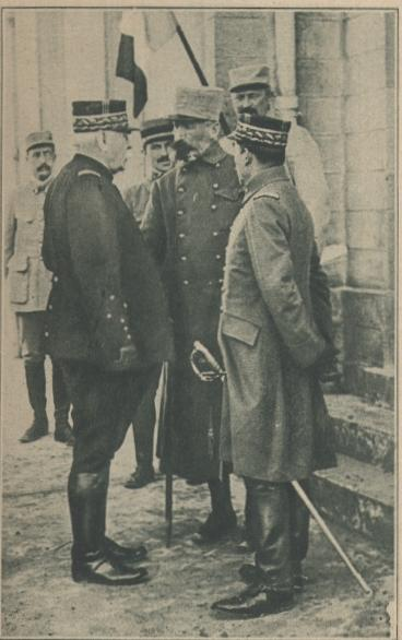 Légende : Le général Joffre et le général de Bazelaire, défenseur de la cote 304.